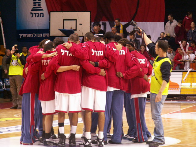 2005/6, שחקני הפועל י"ם במלחה לפני המשחק עם מכבי ת"א